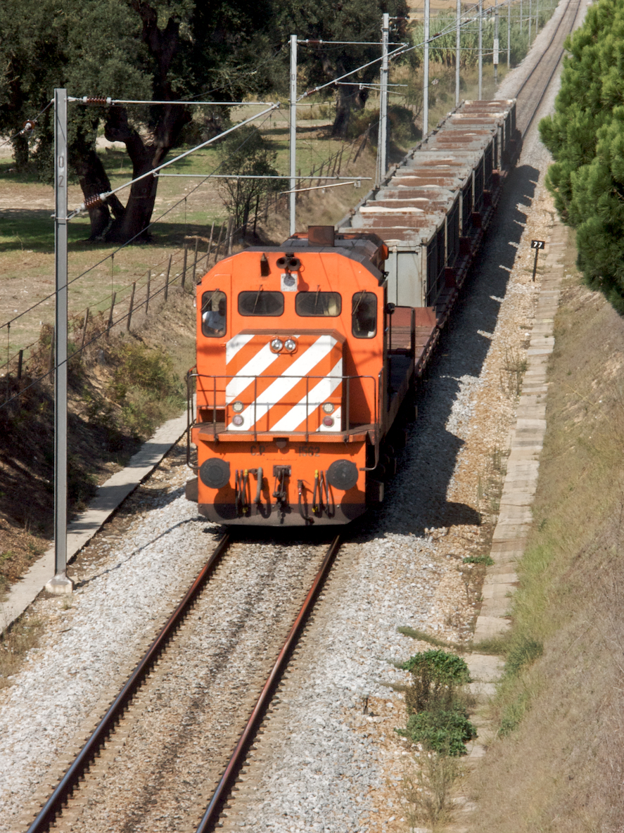 Tipo: Comboio de Transporte de Areia 62897 [Praias do Sado - Loulé] Local: Alcácer do Sal [Linha do Sul, PK 77] Data e hora: 21 de Outubro de 2008 [12h48] Material: Locomotiva 1562 + 9 vagões [8 CP Sgs e 1 CP Rgs (16 contentores areia)]